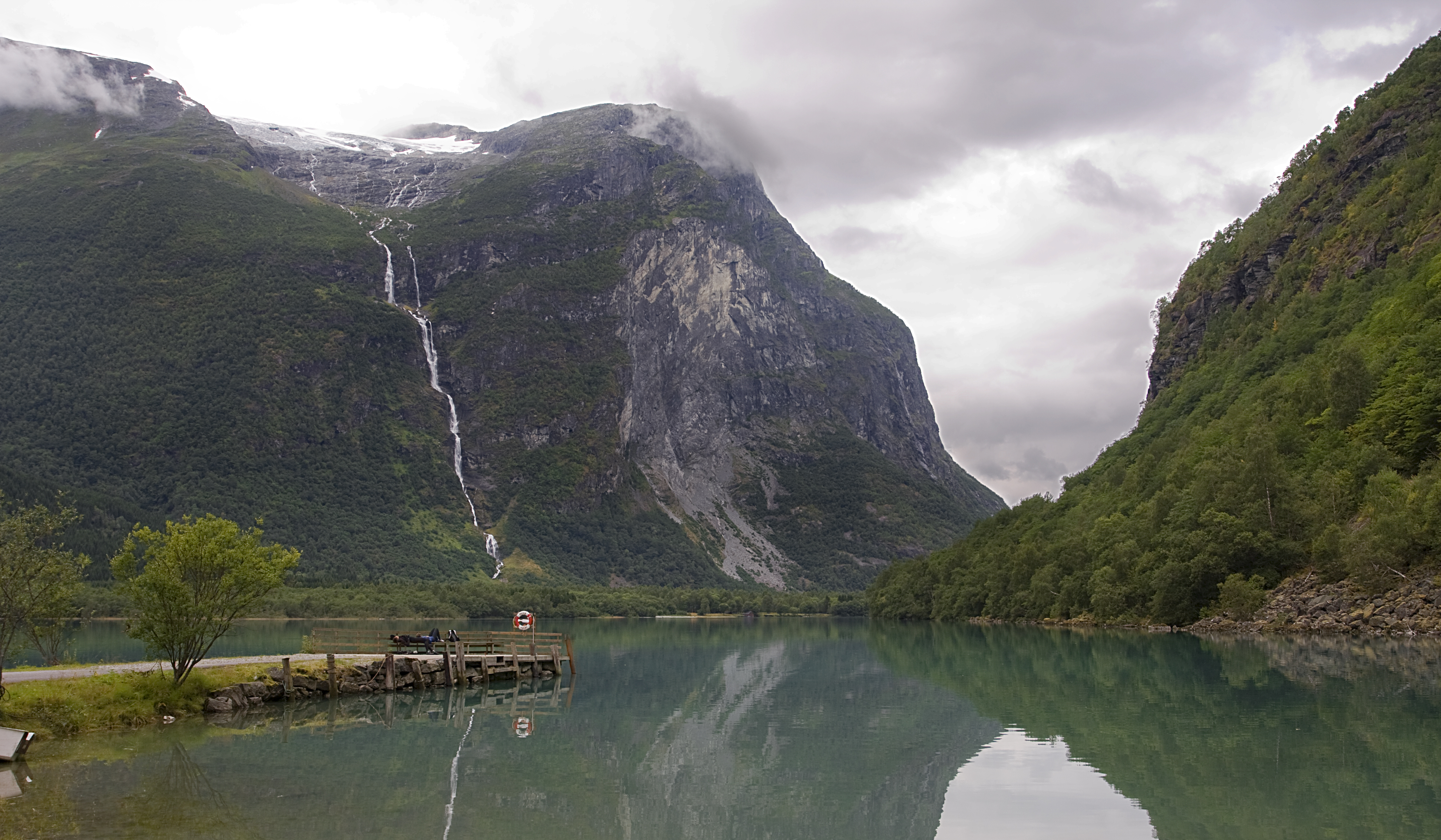 Mount Ramnefjellet and waterfall Ramnefjellfossen, lake Lovatnet